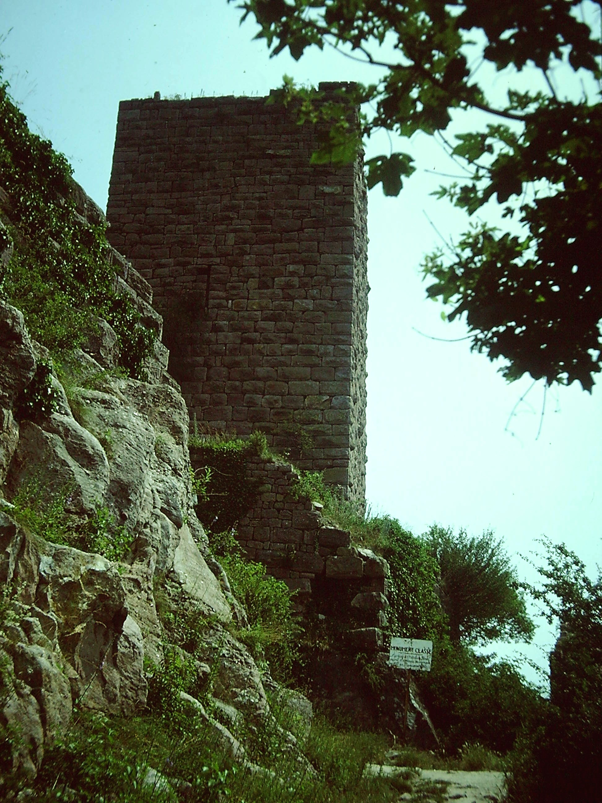 Haut-Eguisheim - Chateau de Vaudèmont (Weckmund) - Vue générale